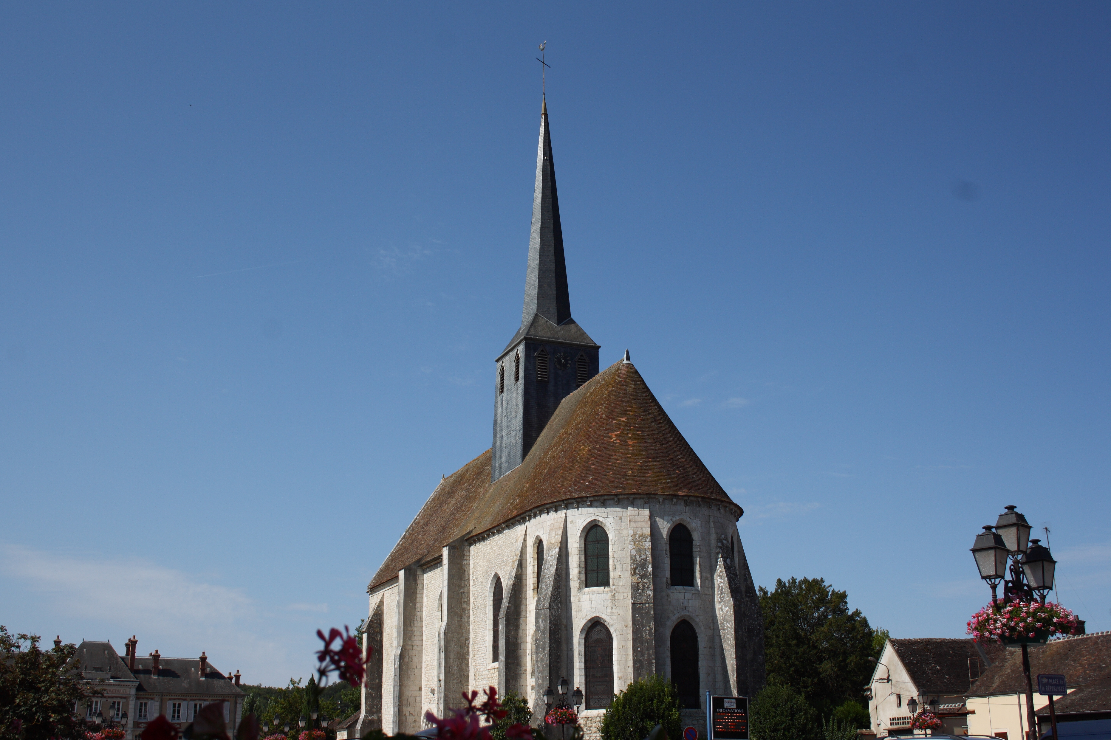 Katholische Pfarrkirche Saint-Clair-Saint-Léger in Souppes-sur-Loing im Département Seine-et-Marne in der Region Île-de-France (Frankreich), Ansicht von Südosten